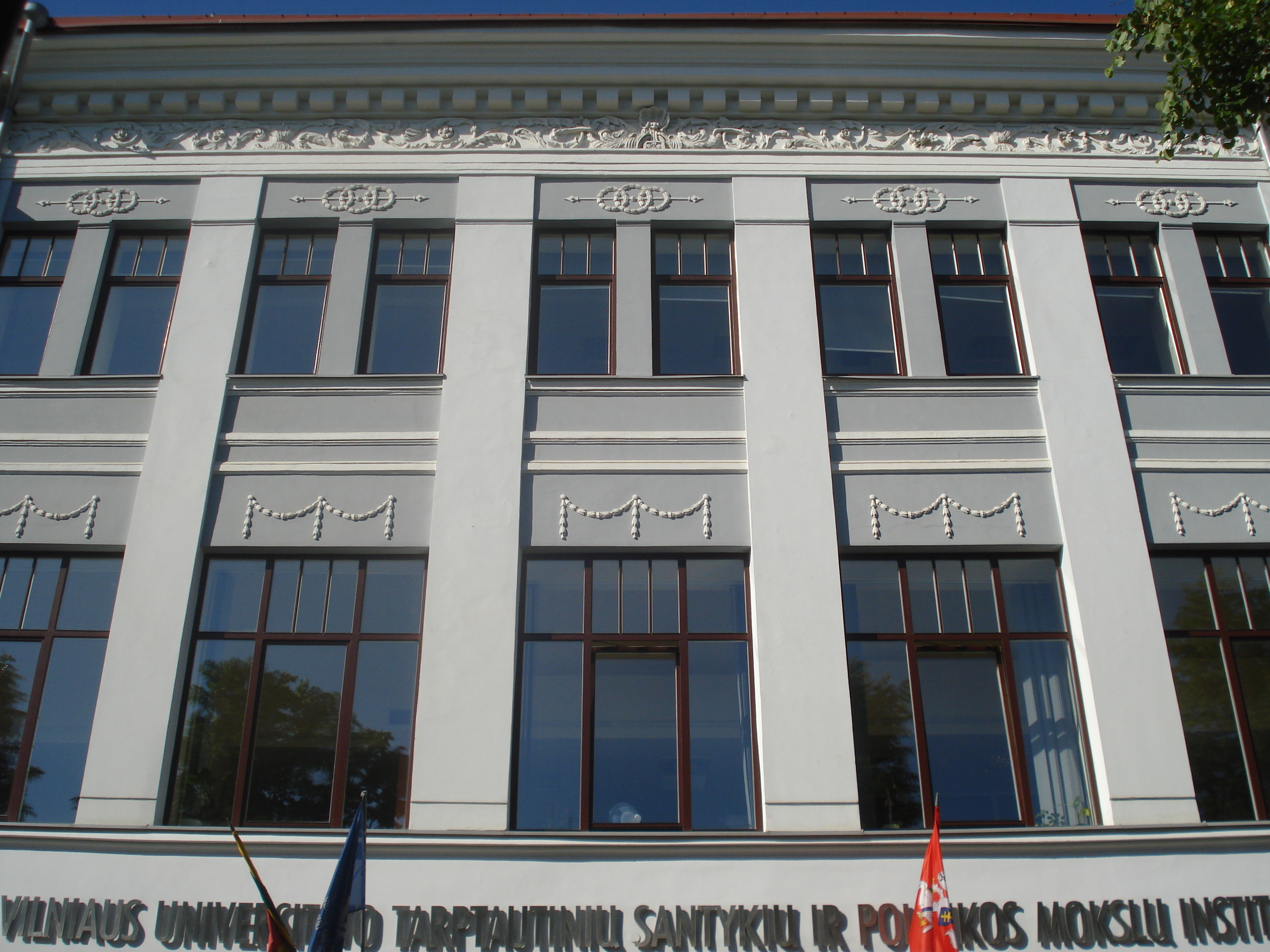 The Institute of International Relations and Political Science (IIRPS) of Vilnius University. VU Tarptautinių santykių ir politikos mokslų institutas (VU TSPMI). Vokiečių g. 10